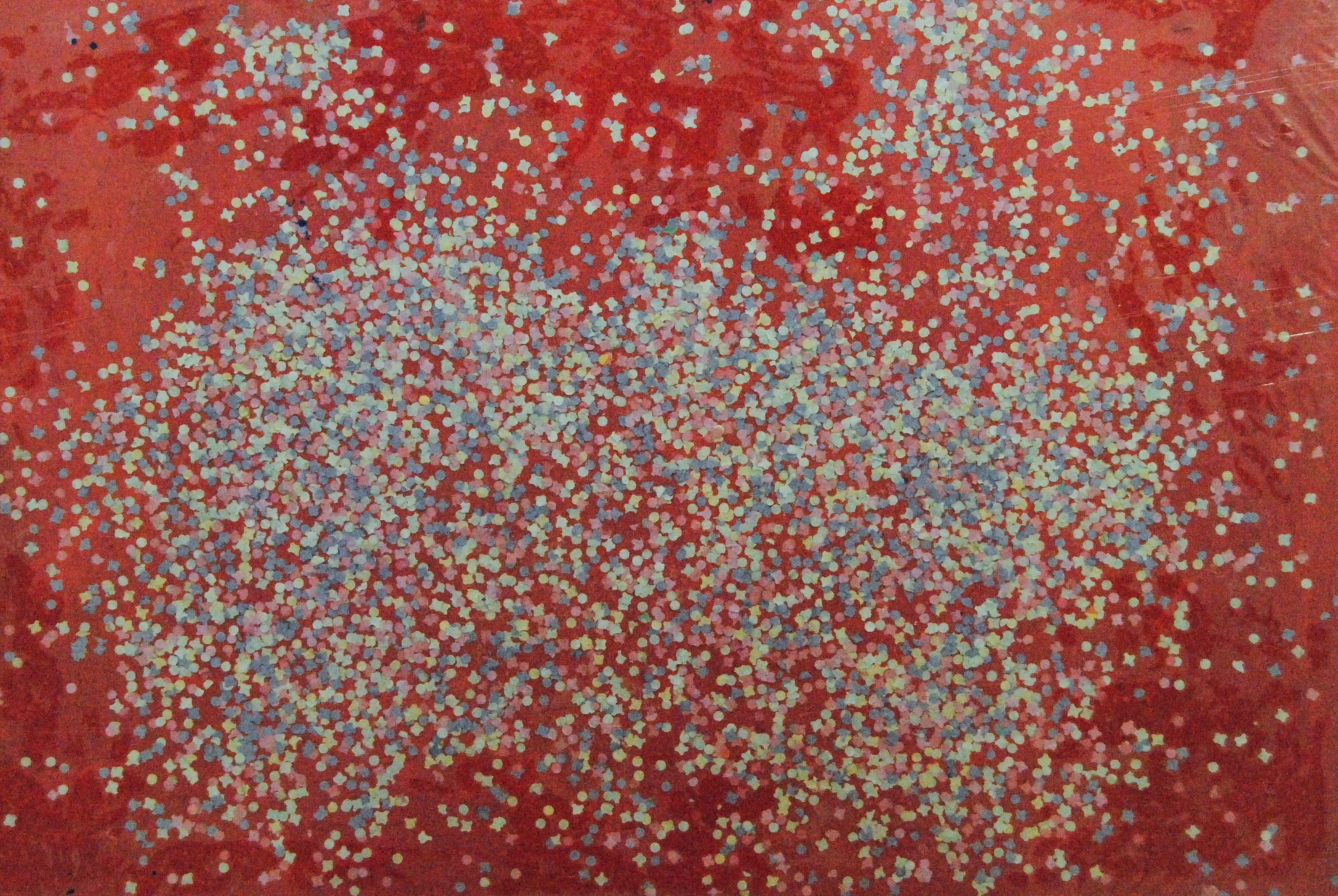 Coriandoli e acrilico su tela anno 1986 cm 70x100